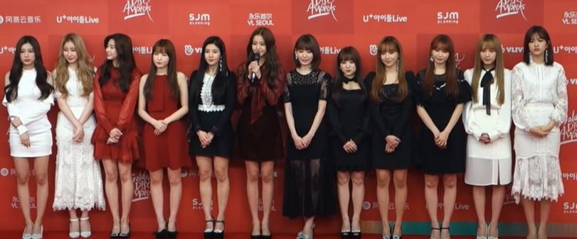 1월 6일 오후 서울시 고척동 고척스카이돔에서 '제33회 골든디스크시상식' 앨범부문 시상식 레드카펫 행사가 열려 포토월에서 아이즈원이 포즈를 취하고 있다.